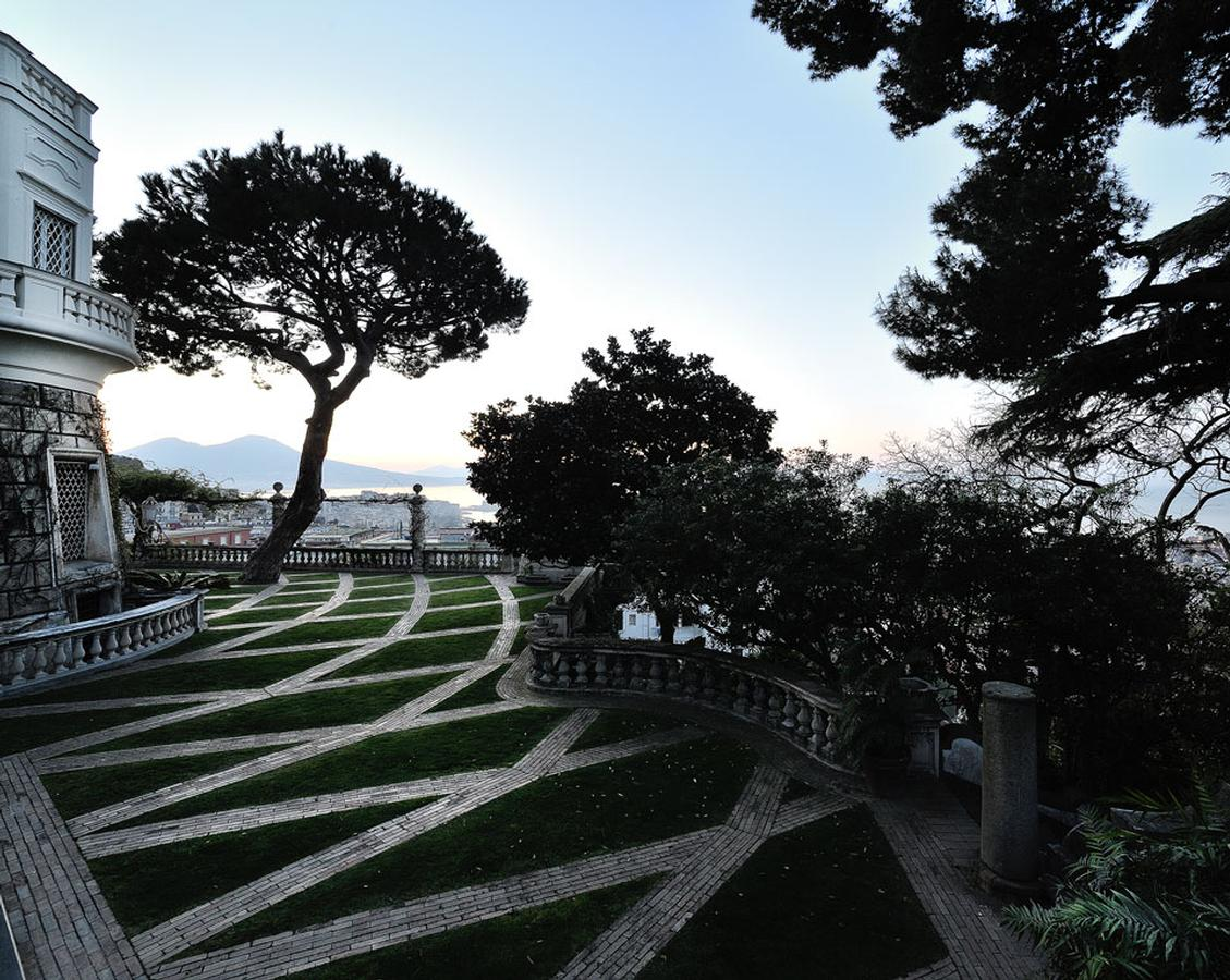 Giardino di Villa Leonetti